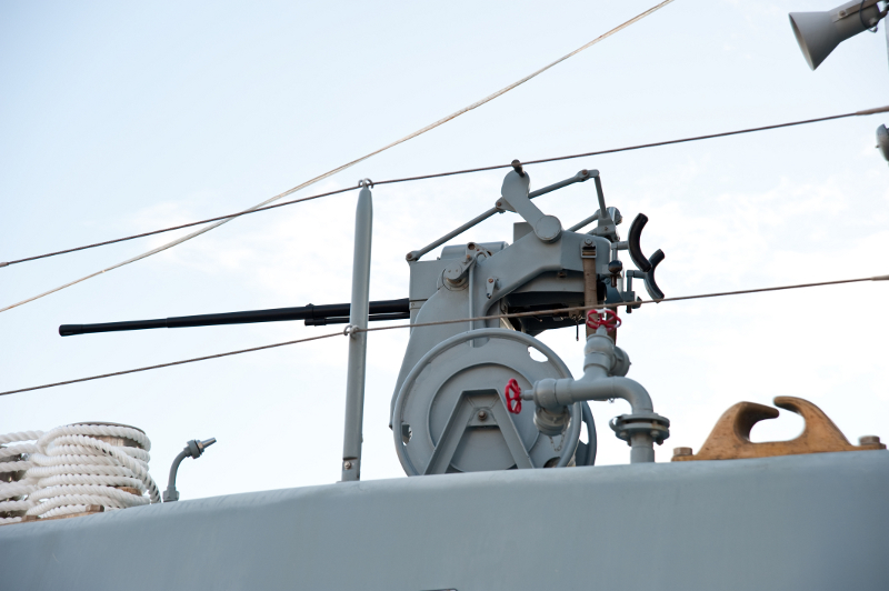 Dan HRM-a, Rijeka